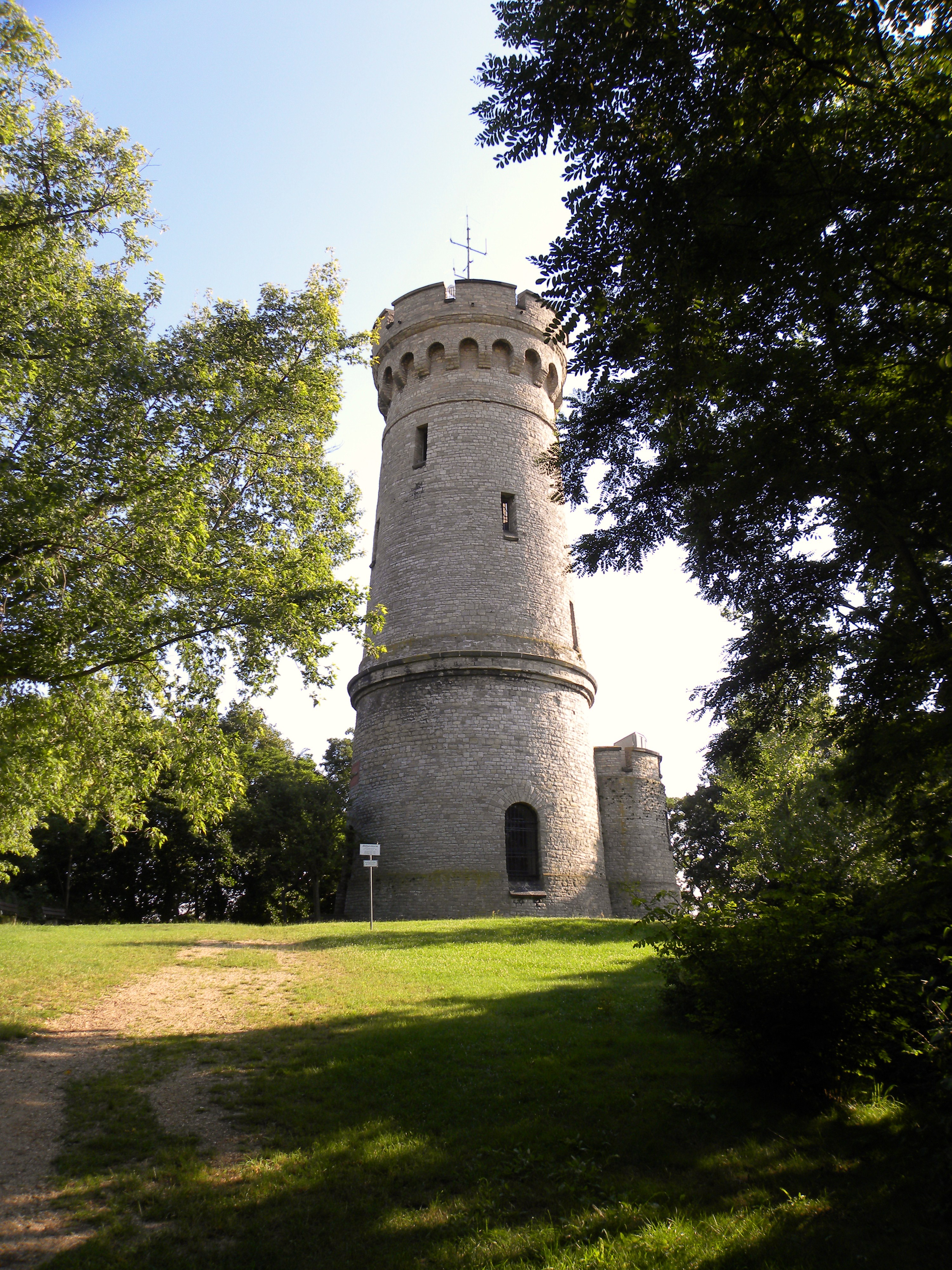 Bismarkturm auf dem Wartenberg bei Calbe